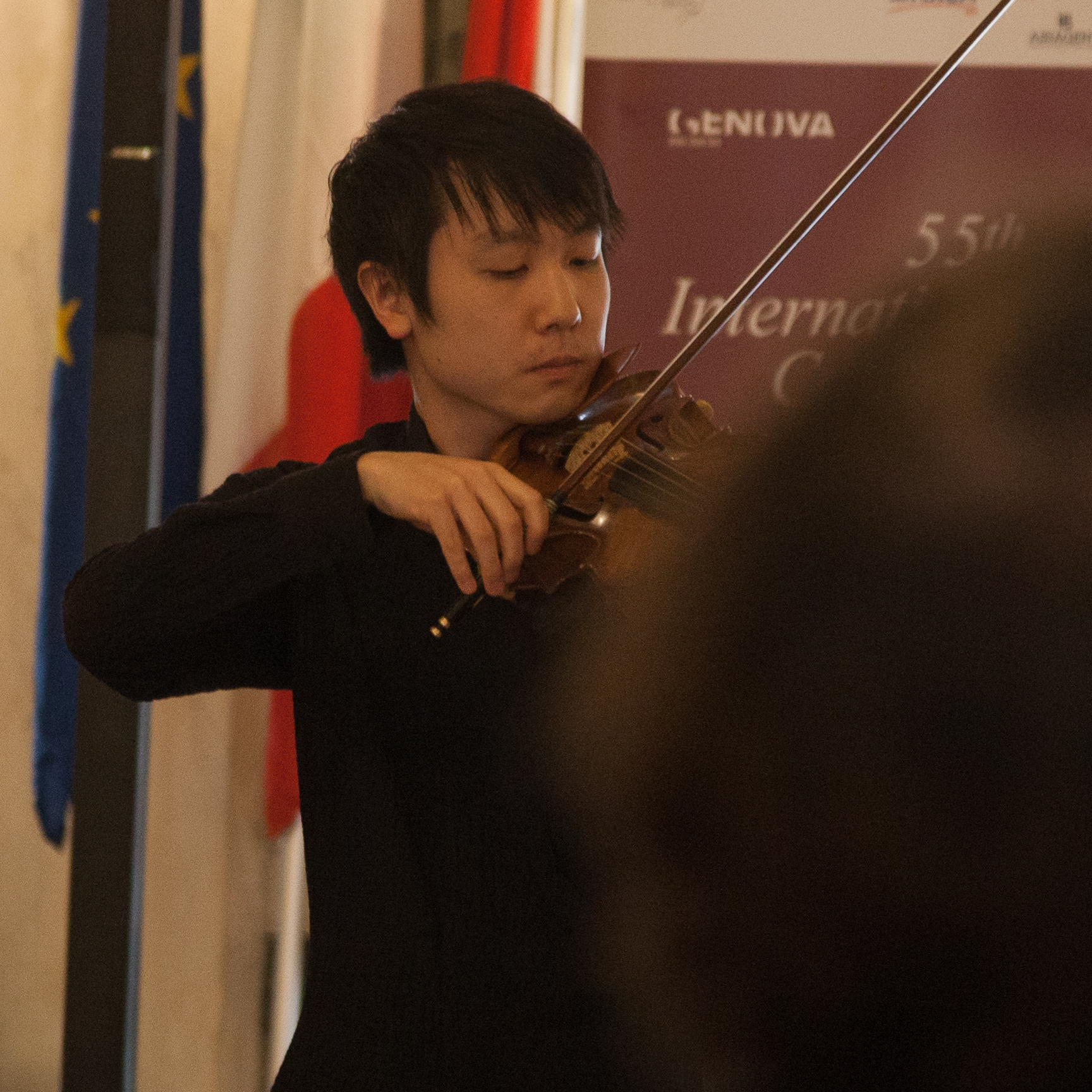 Il violinista Stephen Kim durante le prove preliminari del 55° Premio Paganini